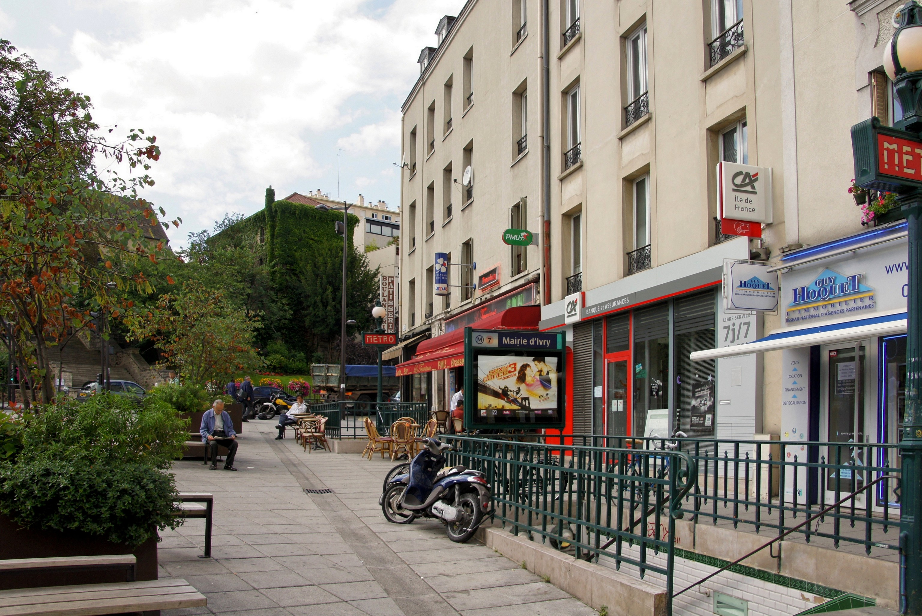 Une vue d'Ivry Sur Seine (94)